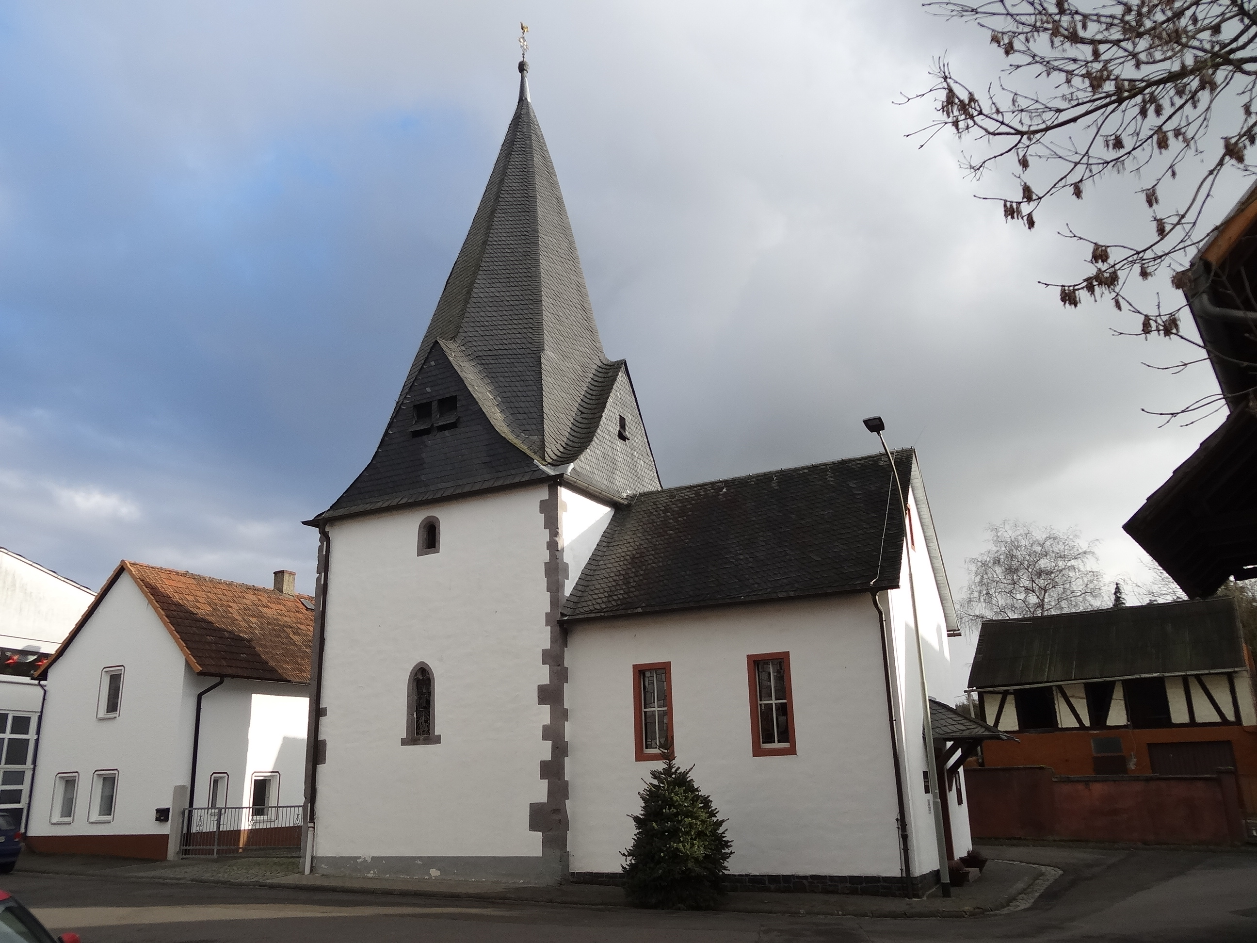 St. Katharina-Kapelle (Hungen-Steinheim)